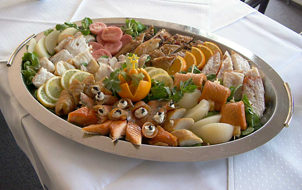 Bildautor: Dorina Andress (Eberswalde) sie hat einer Veröffentlichung unter der Lizenz GNU-FDL zugestimmt. Ralf 09:01, 21. Nov 2004 (CET)